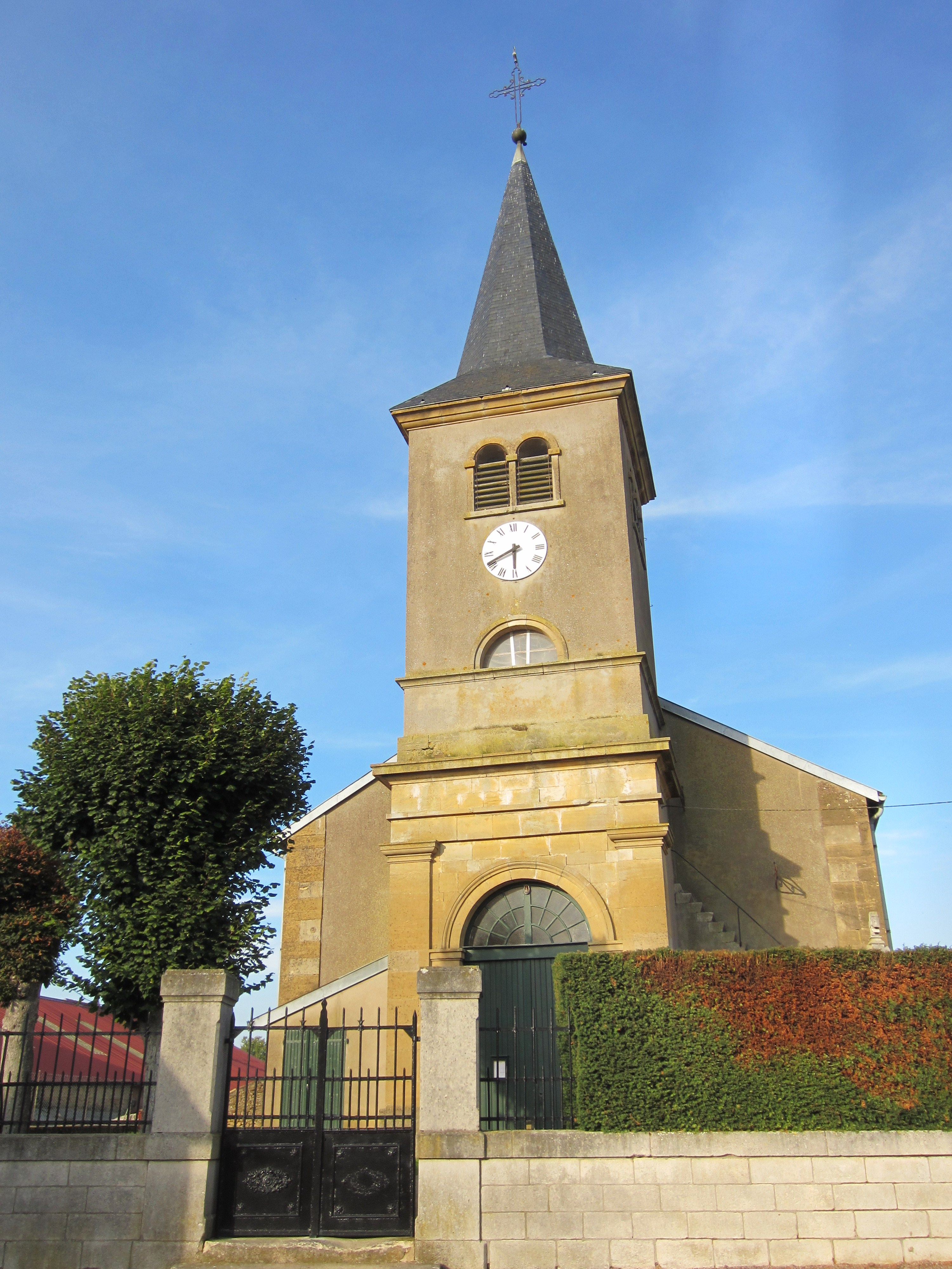 Description Église paroissiale Saint Grégoire le Grand Hannonville Suzemont Église paroissiale Saint Grégoire le Grand Hannonville Suzemont